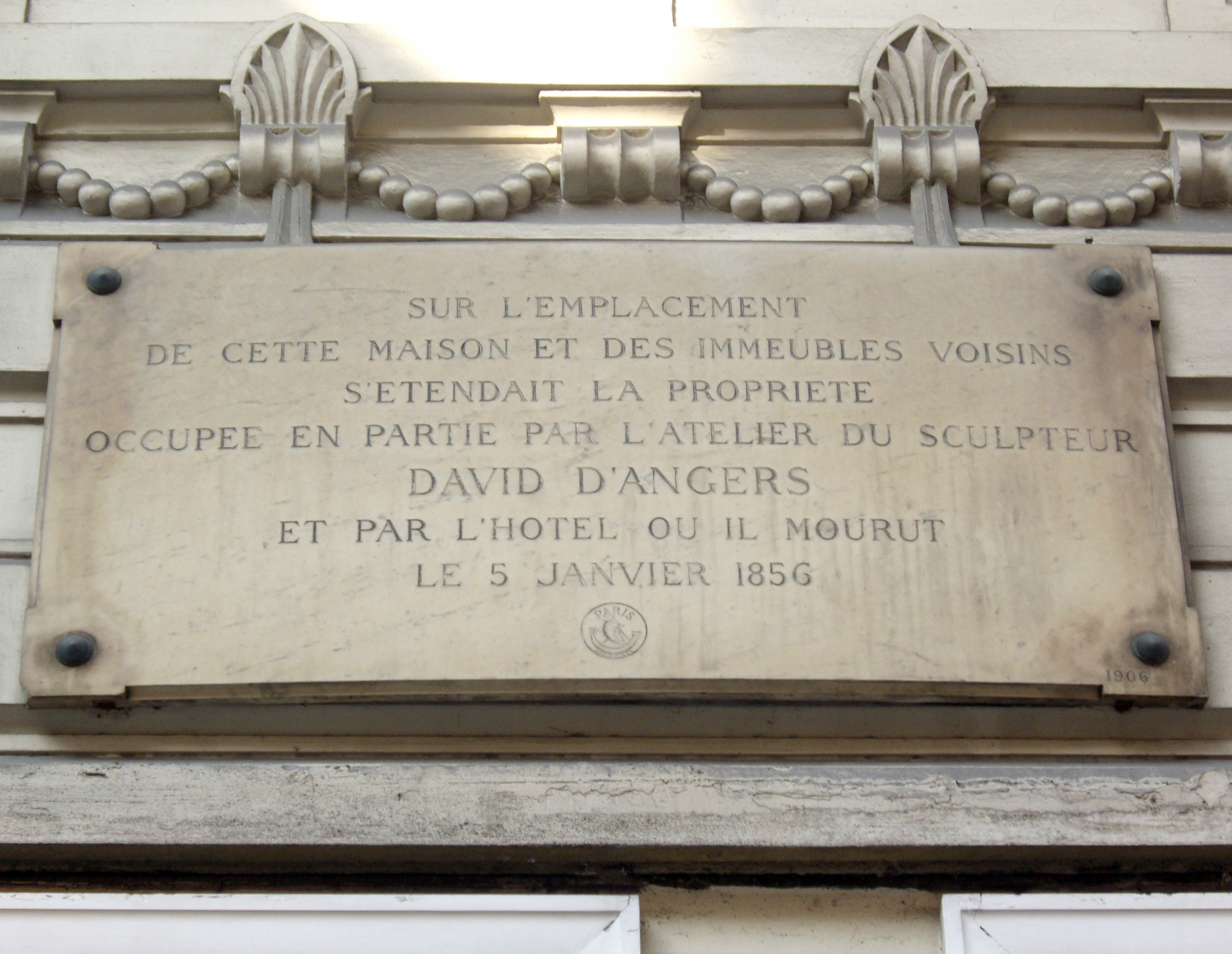 Plaque apposée au n° 20 de la rue d'Assas, Paris 6e.« Sur l'emplacement de cette maison et des immeubles voisins s'étendait la propriété occupée en partie par l'atelier du sculpteur David d'Angers et par l'hôtel où il mourut le 5 janvier 1856. »